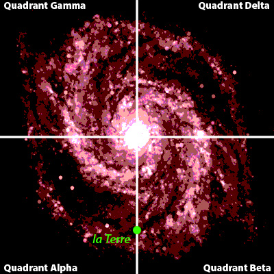 galaxie_star_trek Auteur : Valérie. Sujet : La cartographie de la galaxie dans l'univers de Star Trek. Date de création de l'image : 26 octobre 2004 Licence : Licence GFDL. Auteur : Utilisateur:Valérie75 Utilisateur:Valérie75